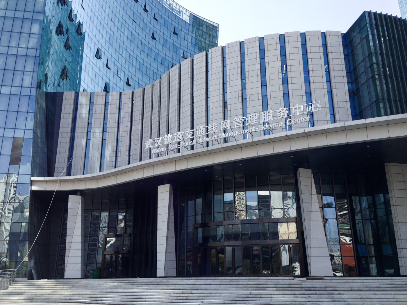 中文（中国大陆）: 武汉轨道交通线网服务管理中心